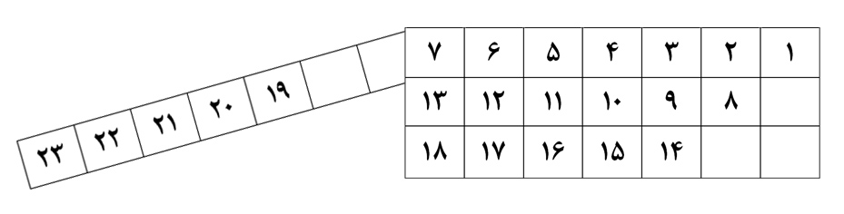 نمودار مشخص‌کنندهٔ محل افراد ملل متفاوت بر روی دیوارهٔ پلکان رو به جنوب کاخ آپادانا در تخت جمشید. ۱- مادی‌ها ۲- عیلامی‌ها ۳- پارت‌ها ۴- سغدی‌ها ۵- مصری‌ها ۶- باختری‌ها ۷- اهالی سیستان ۸- اهالی ارمنستان ۹- بابلی‌ها ۱۰- اهالی کلیکیه ۱۱- سکاهای کلاه‌تیزخود ۱۲- ایونی‌ها ۱۳- اهالی سمرقند ۱۴- فنیقی‌ها ۱۵- اهالی کاپادوکیه ۱۶- اهالی لیدی ۱۷- اراخوزی‌ها ۱۸- هندی‌ها ۱۹- اهالی مقدونیه ۲۰- اعراب ۲۱- آشوری‌ها ۲۲- لیبی‌ها ۲۳- اهالی حبشه